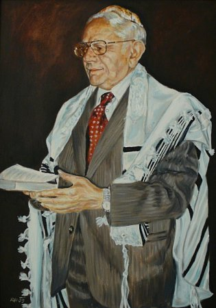 Portrét Chaima Kleina z"l z pozustalosti paní Cecilie Ley Kleinové z"l, Teplice, 2003